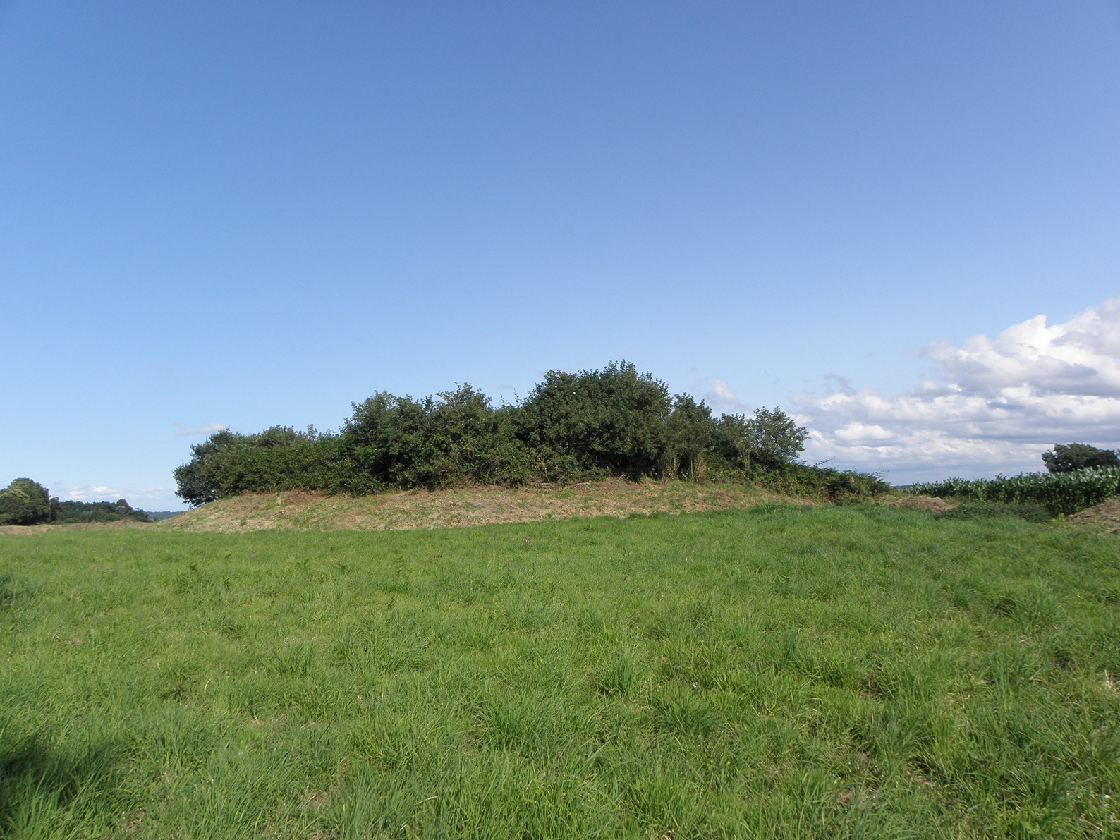 Le tertre des Lapins. Tumulus sis près de Kérugou en Lanmeur (29).